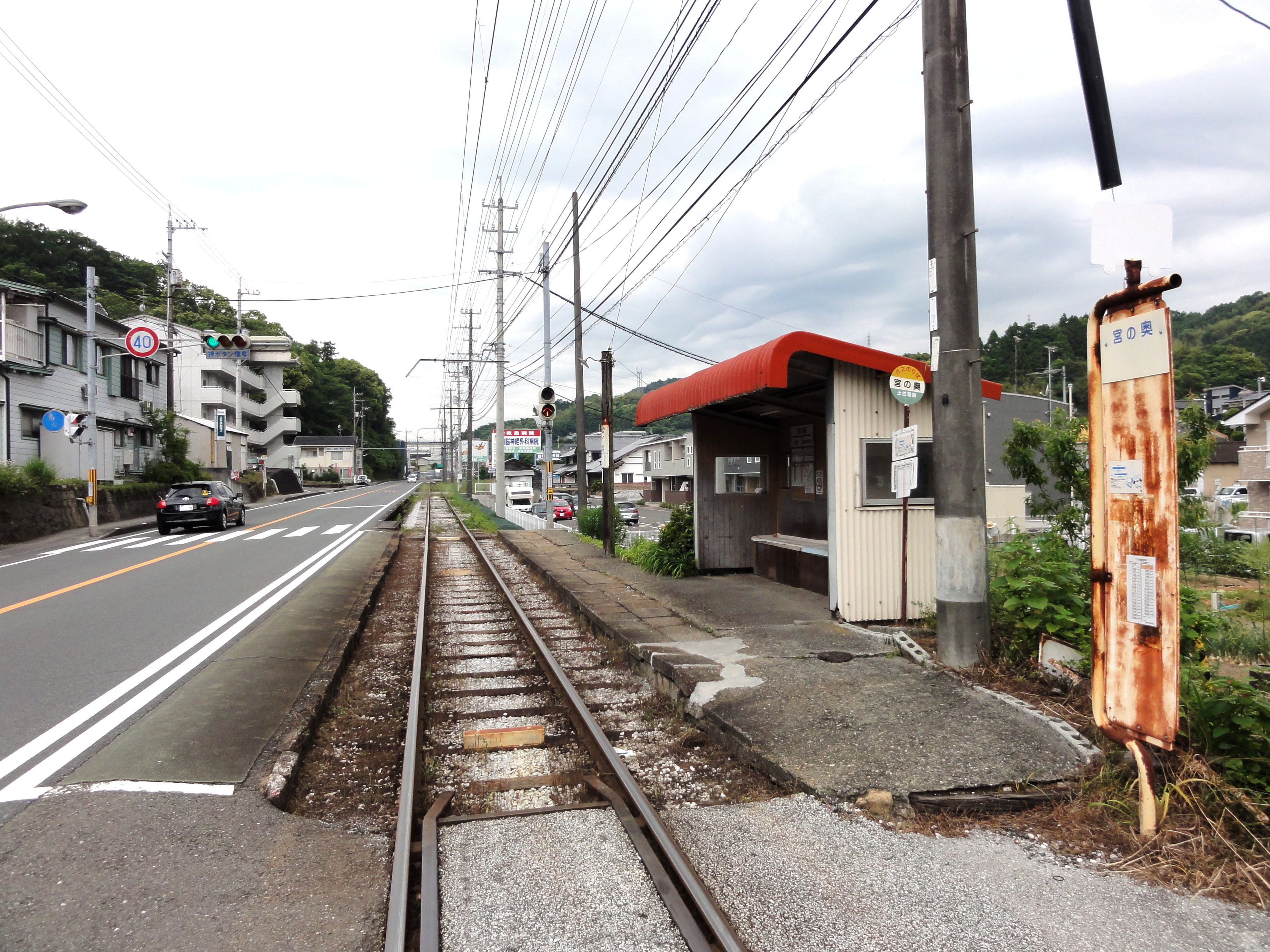 土佐電気鉄道宮の奥駅